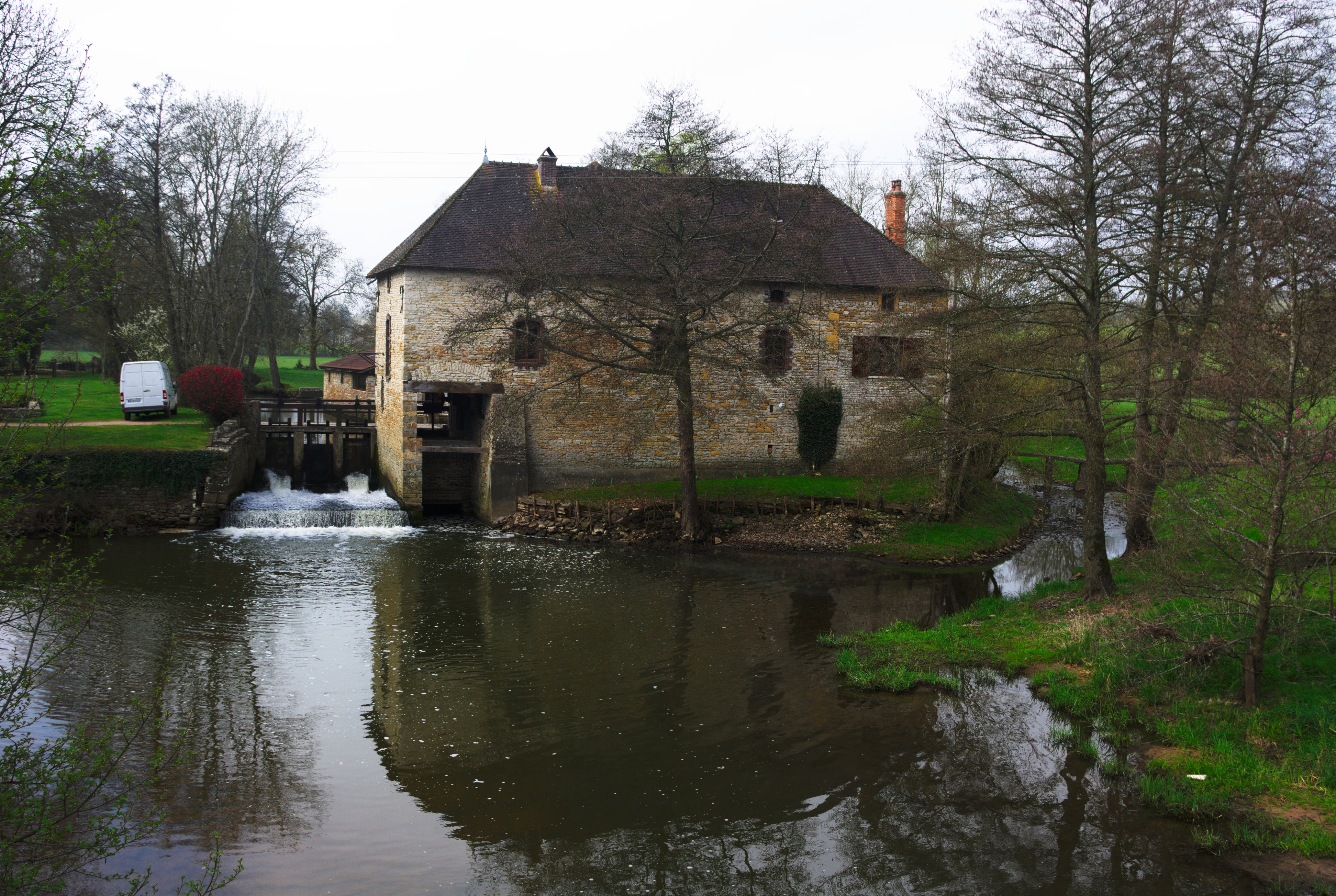 Moulin d'Angoin